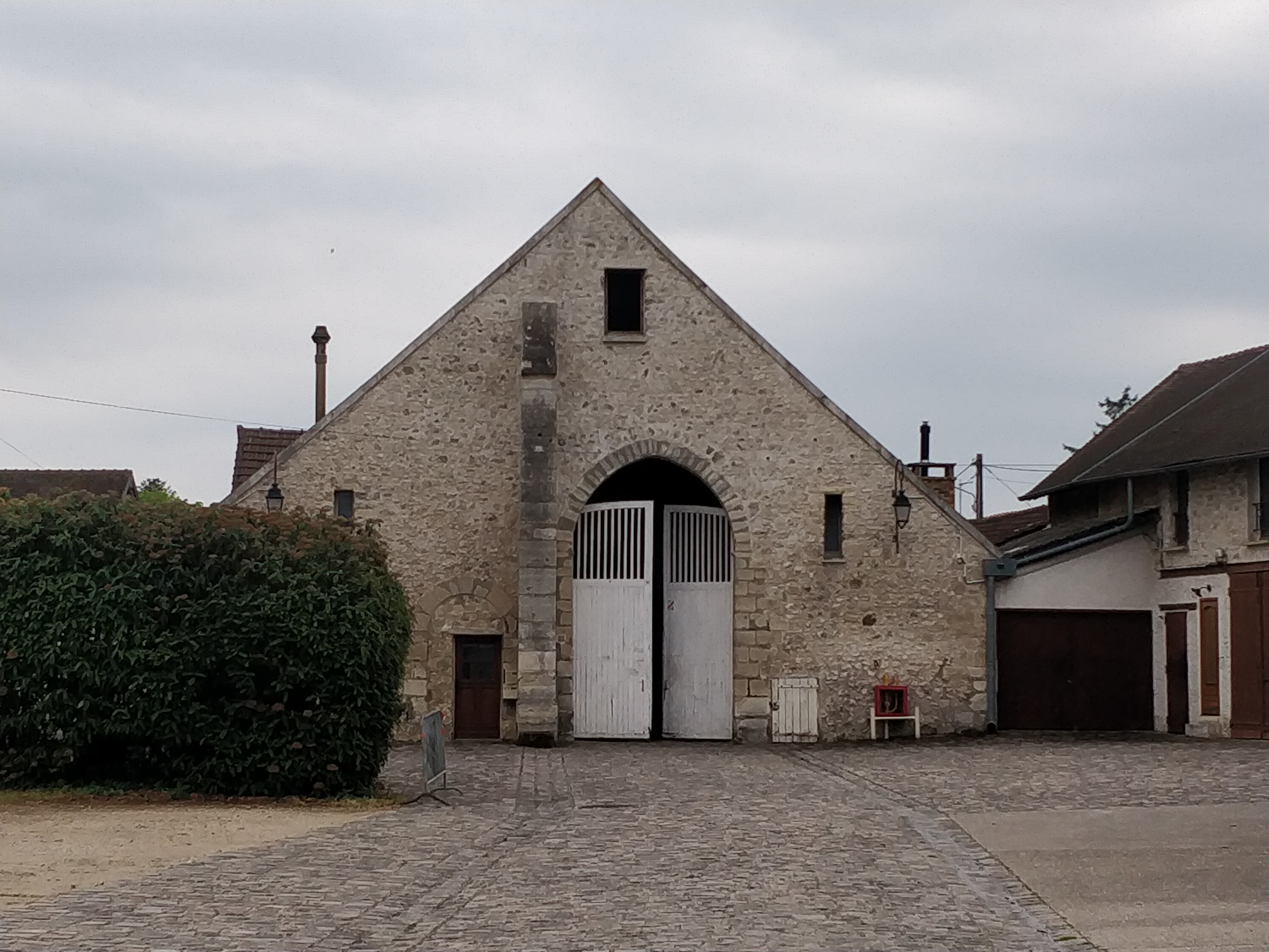 Grange aux dîmes, Wissous.